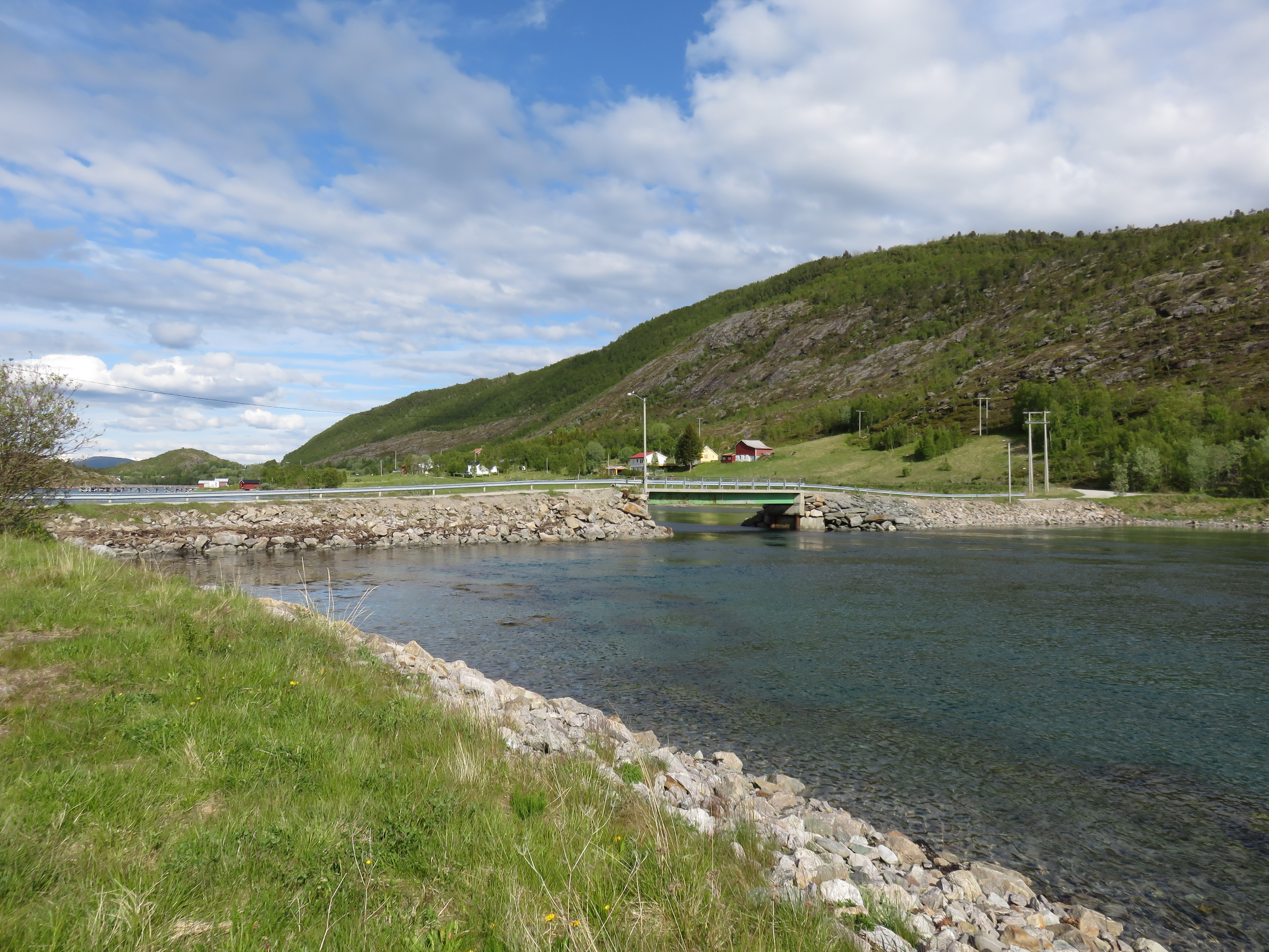 Vargfjorden i Ballangen. Bro over fjorden.